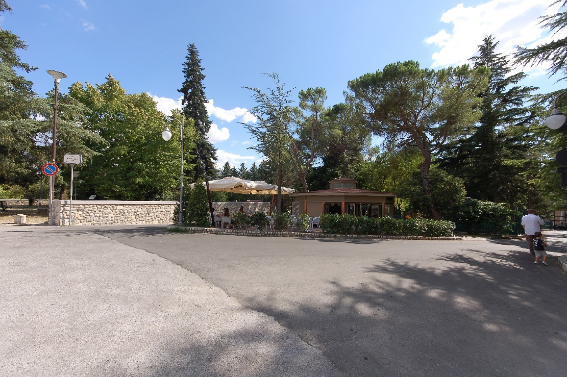 L'Aquila 2011